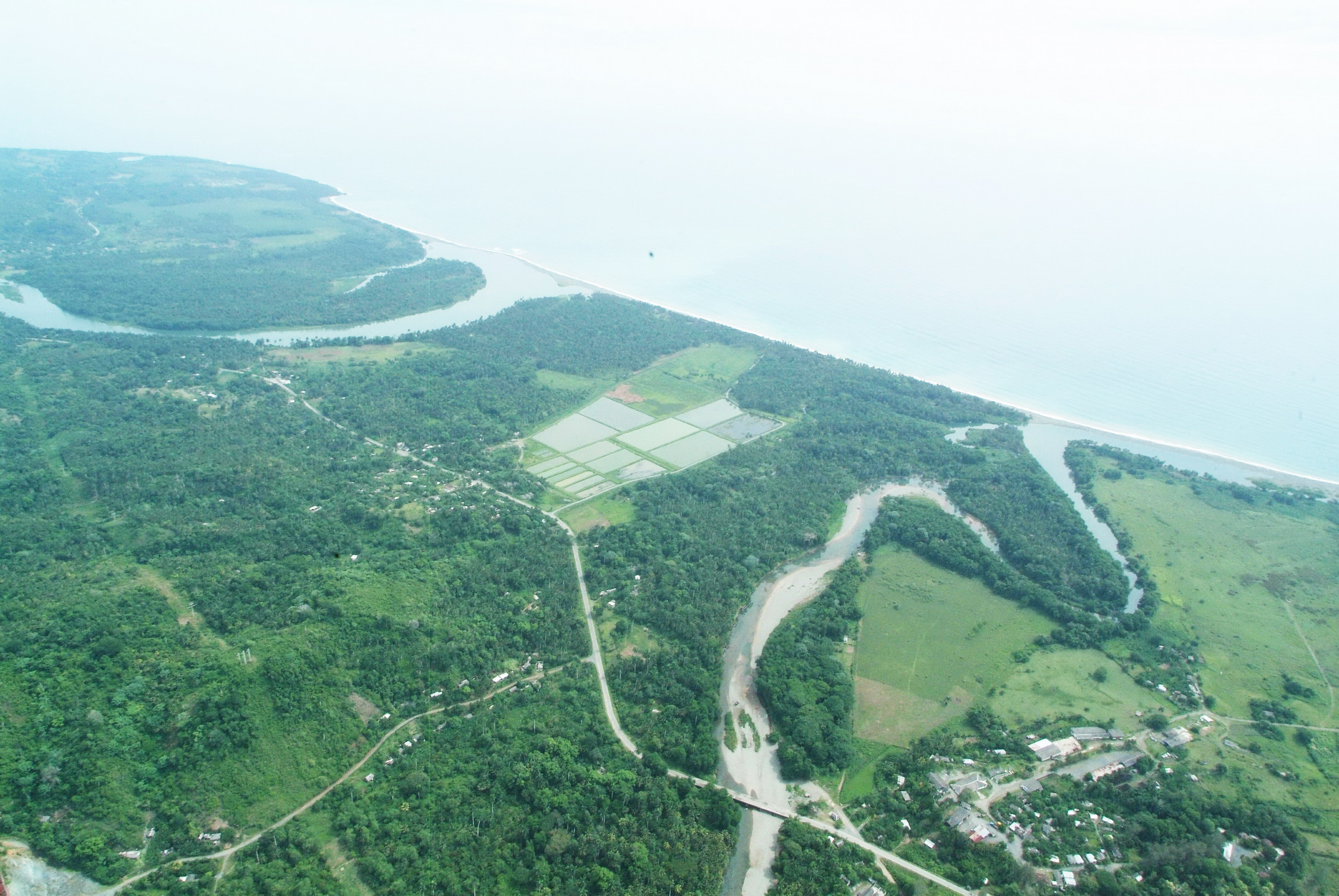 En esta foto se pueden ver los rion Toa (izquierda) y el otro El Duaba, estos son los dos rios mas caudalosos de Baracoa, el Toa es el mas caudaloso de Cuba